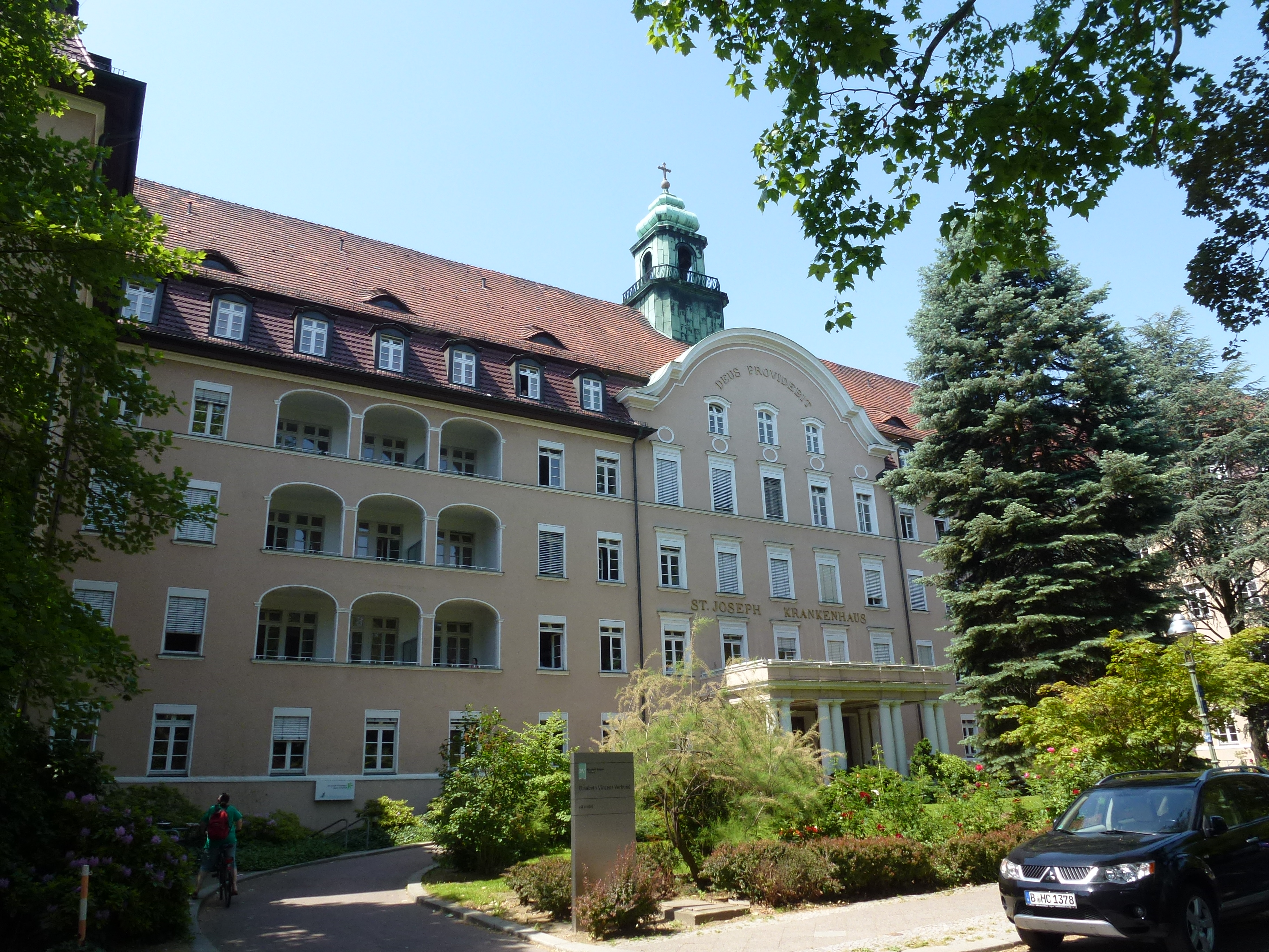 Berlin-Tempelhof Boelckestraße St-Joseph Krankenhaus